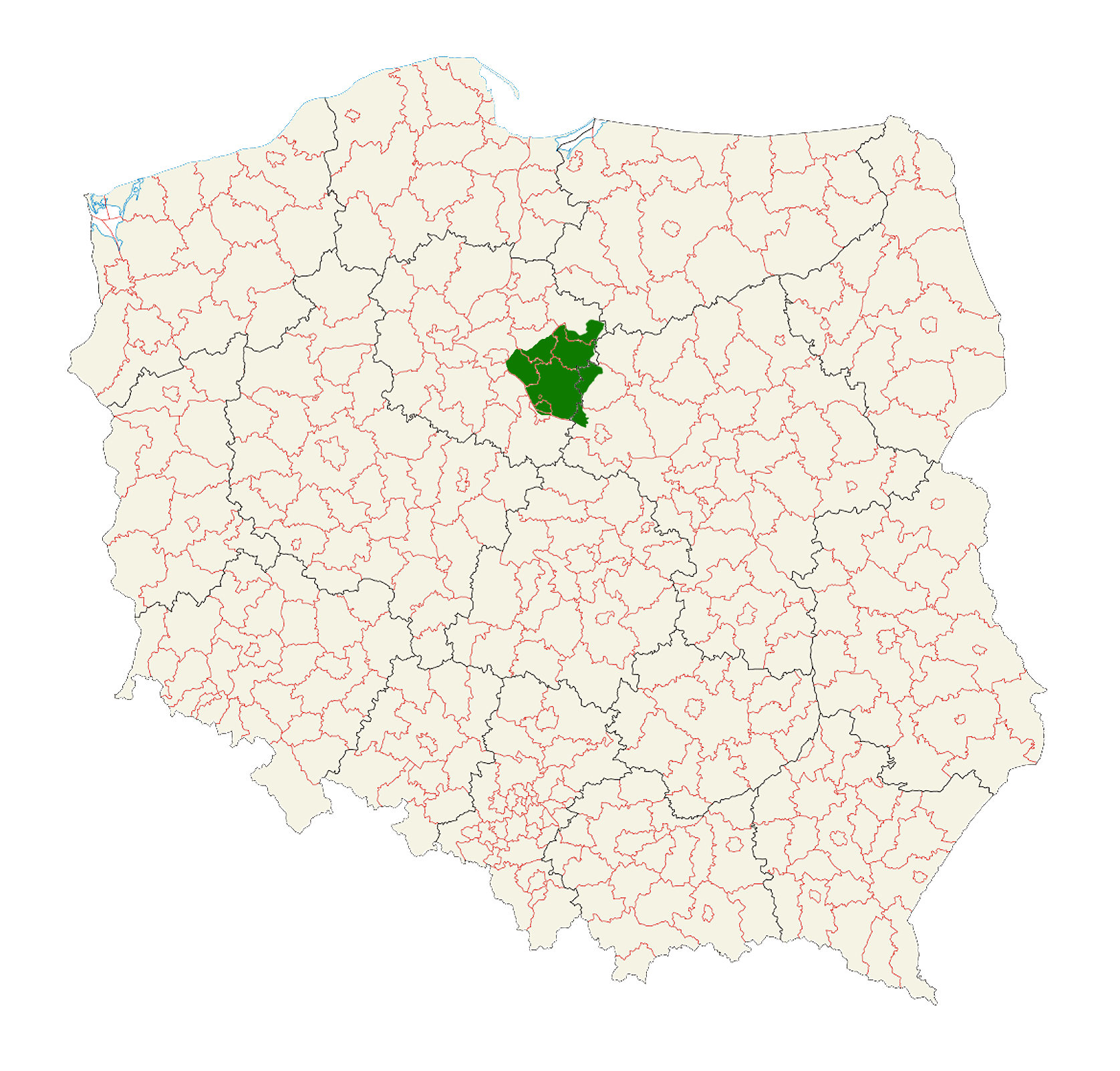 Location of ziemia dobrzynska region in Poland.